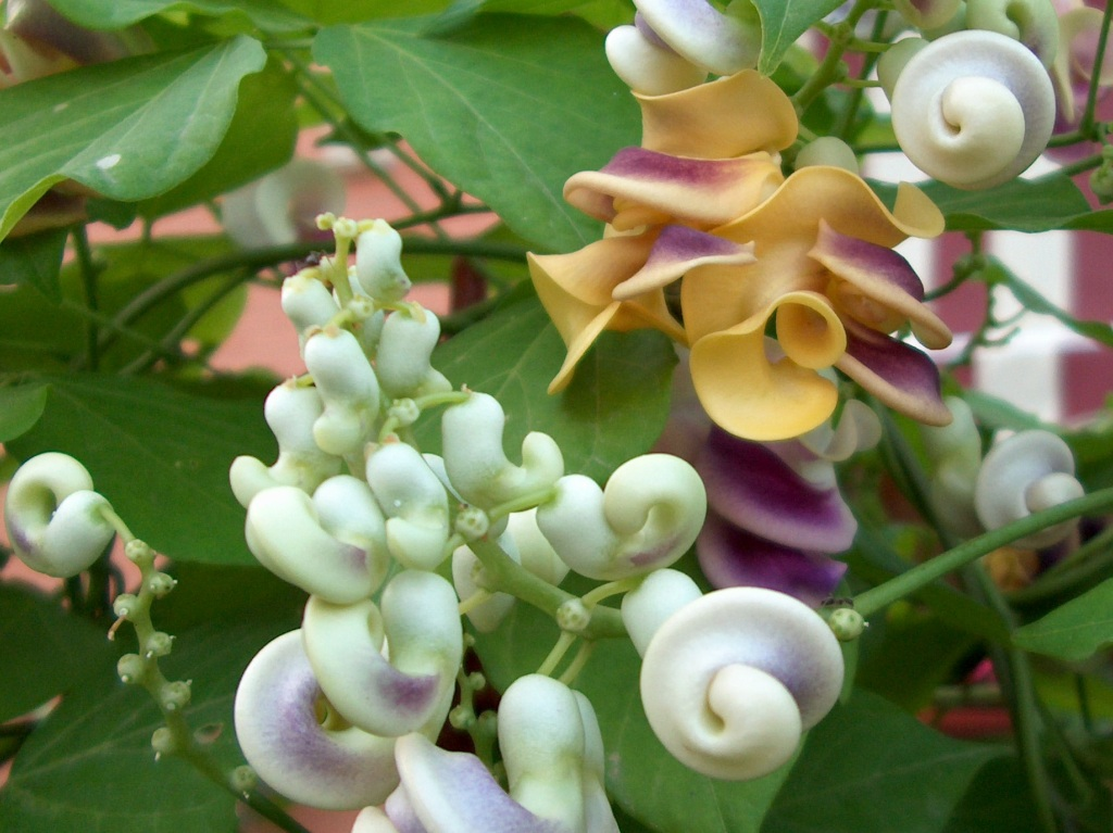 Vigna caracalla